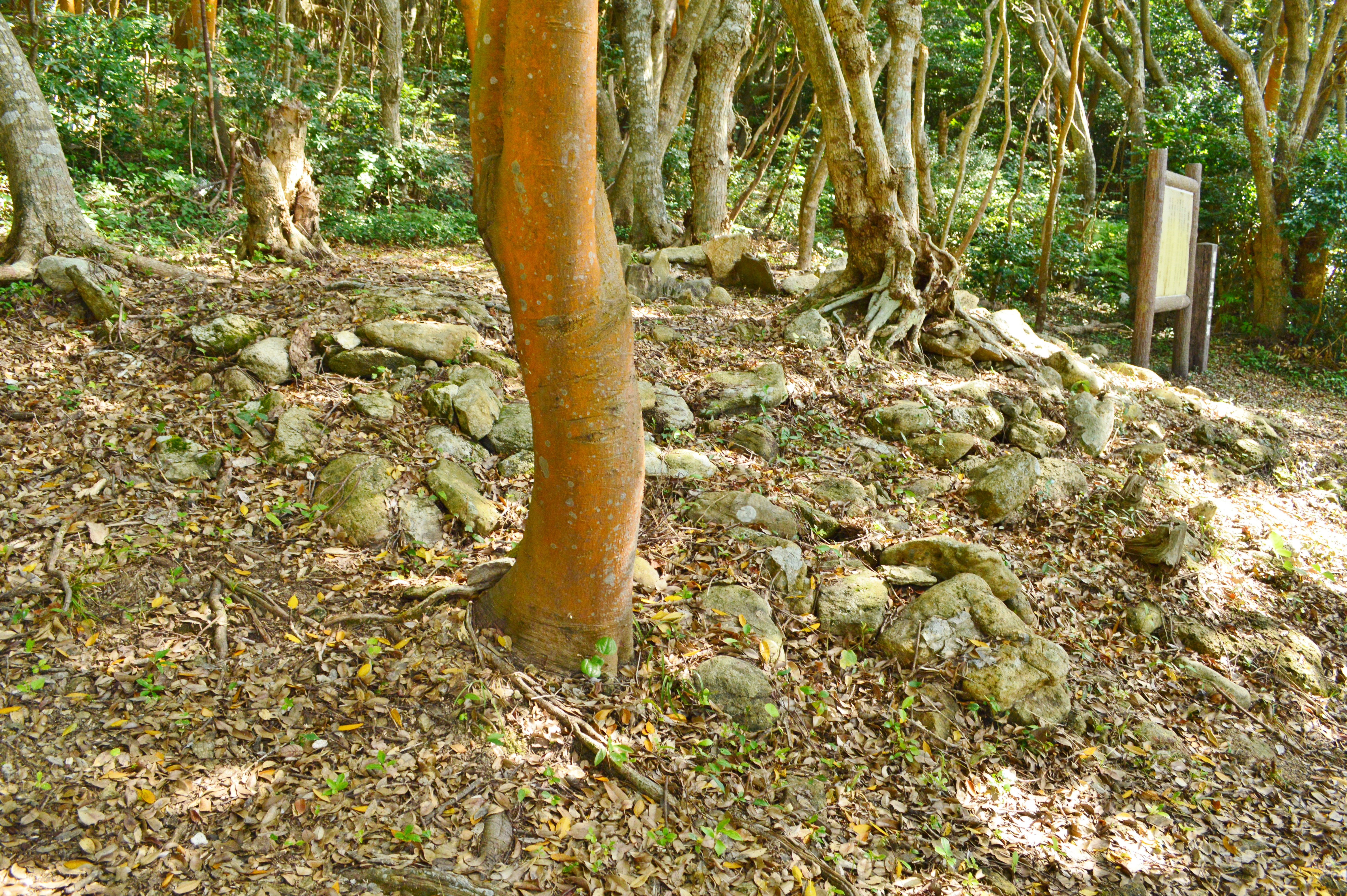 根曽第5号墳 墳丘全景